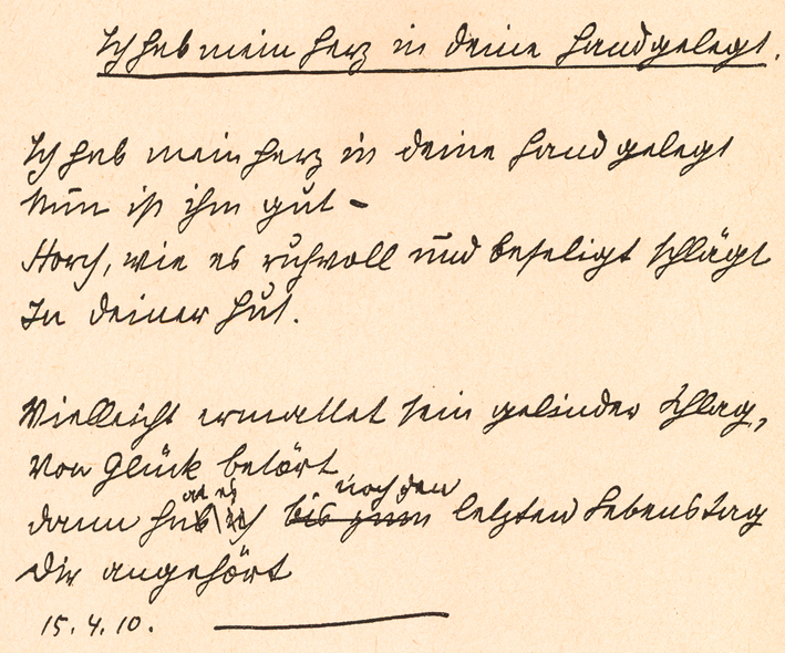 Handschrift von Ernst Goll